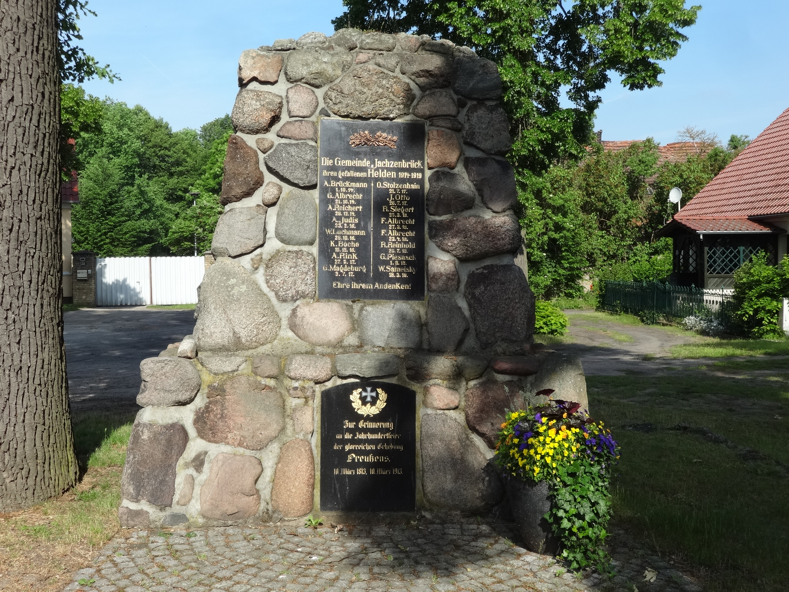 Vorderseite des Denkmals für die Gefallenen der Weltkriege in Lindenbrück, ein Ortsteil der Gemeinde Zossen in Brandenburg